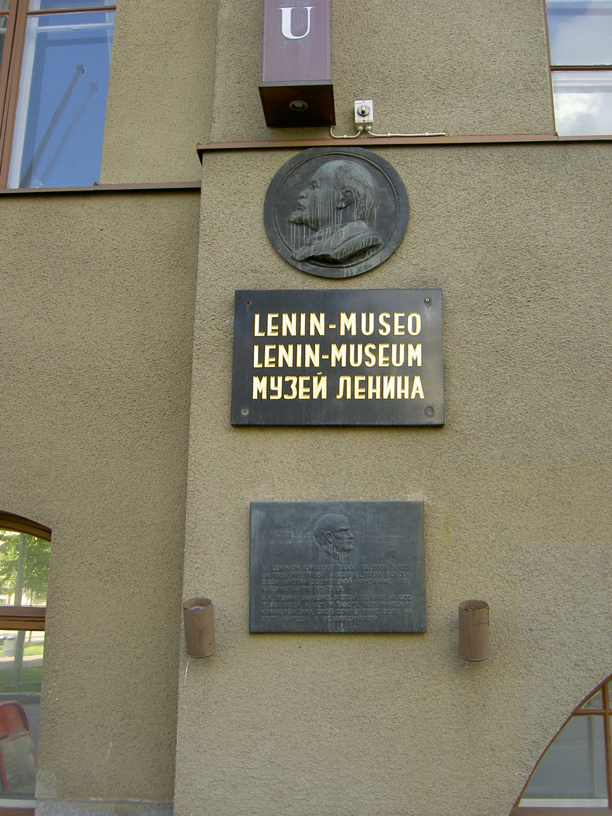 Lenin-museum in Tampere, Finland.